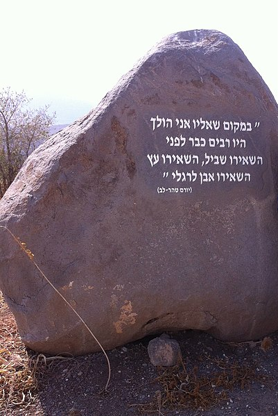 בית משירו של יורם טהרלב "במקום אליו אני הולך" חקוק על סלע